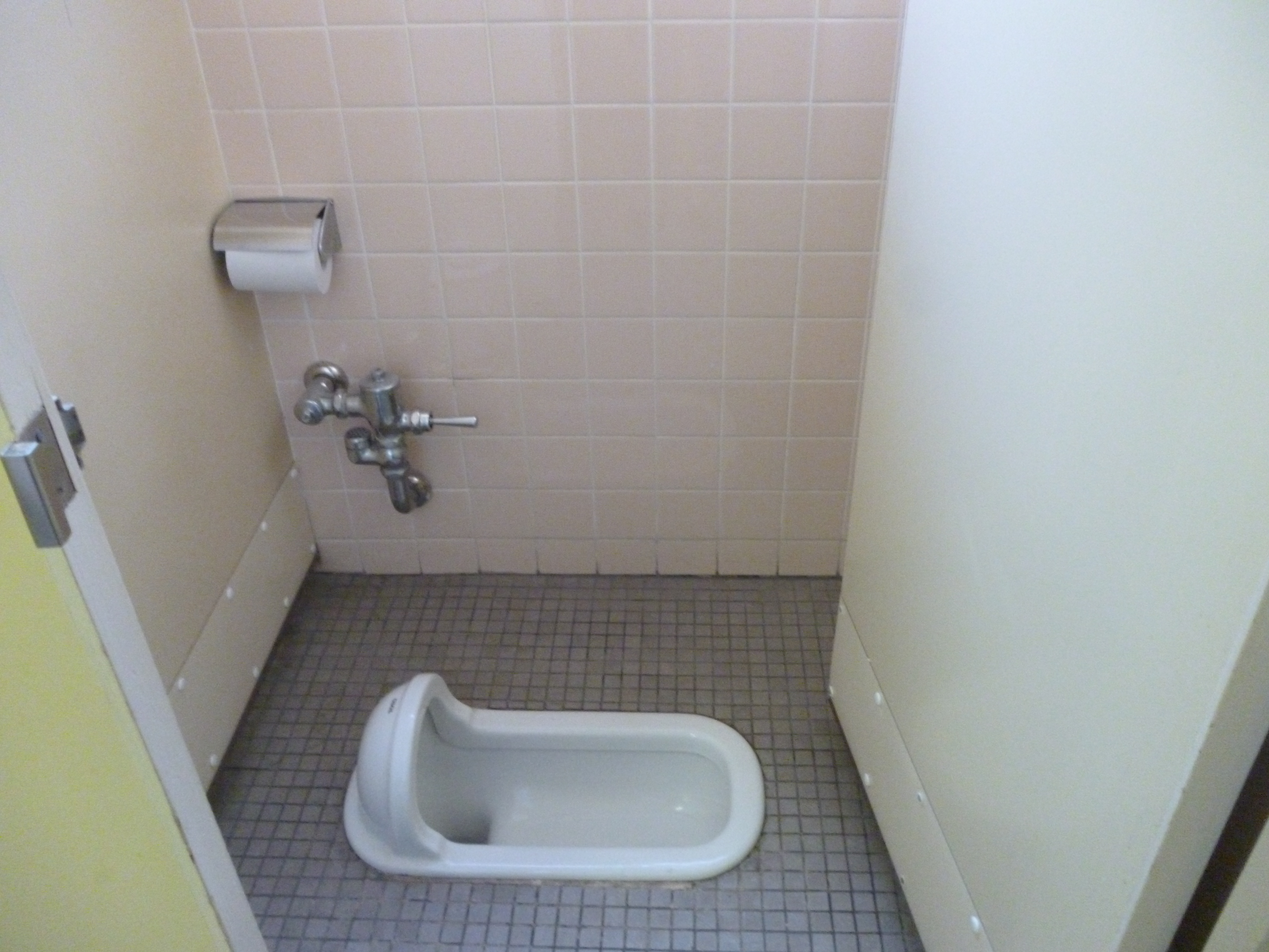 TOTO75